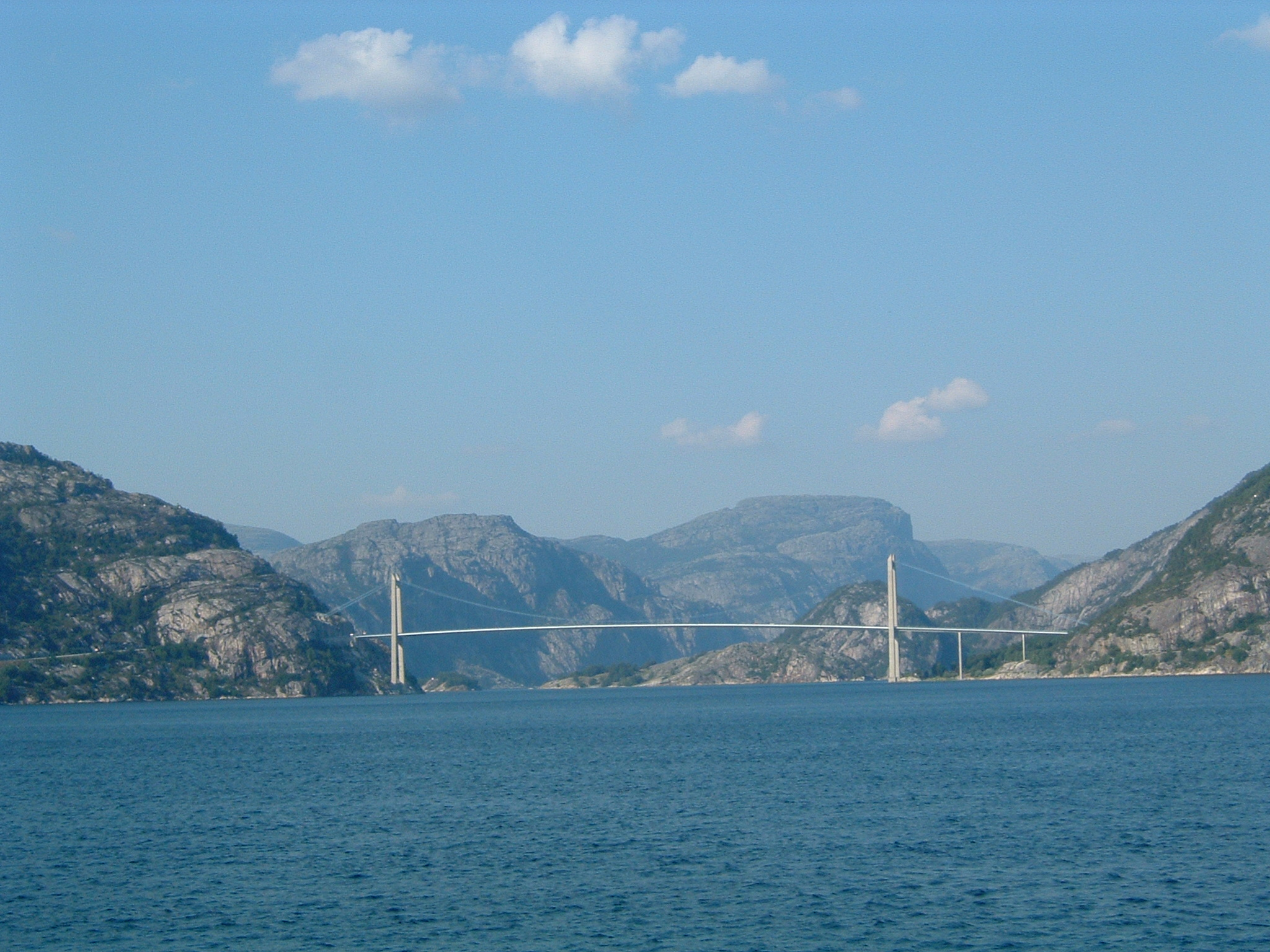 Beskrivelse: Lysefjordbrua sett fra Høgsfjordferja på vei til Oanes. Kilde: Tok bildet selv den 8. august 2004 Fotograf: Hallvard Nygård